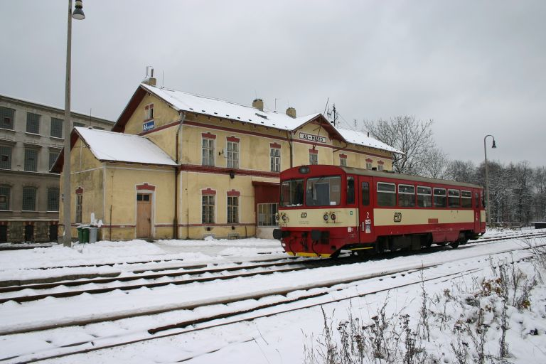 Motorový vůz řady 810 na nádraží Aš město